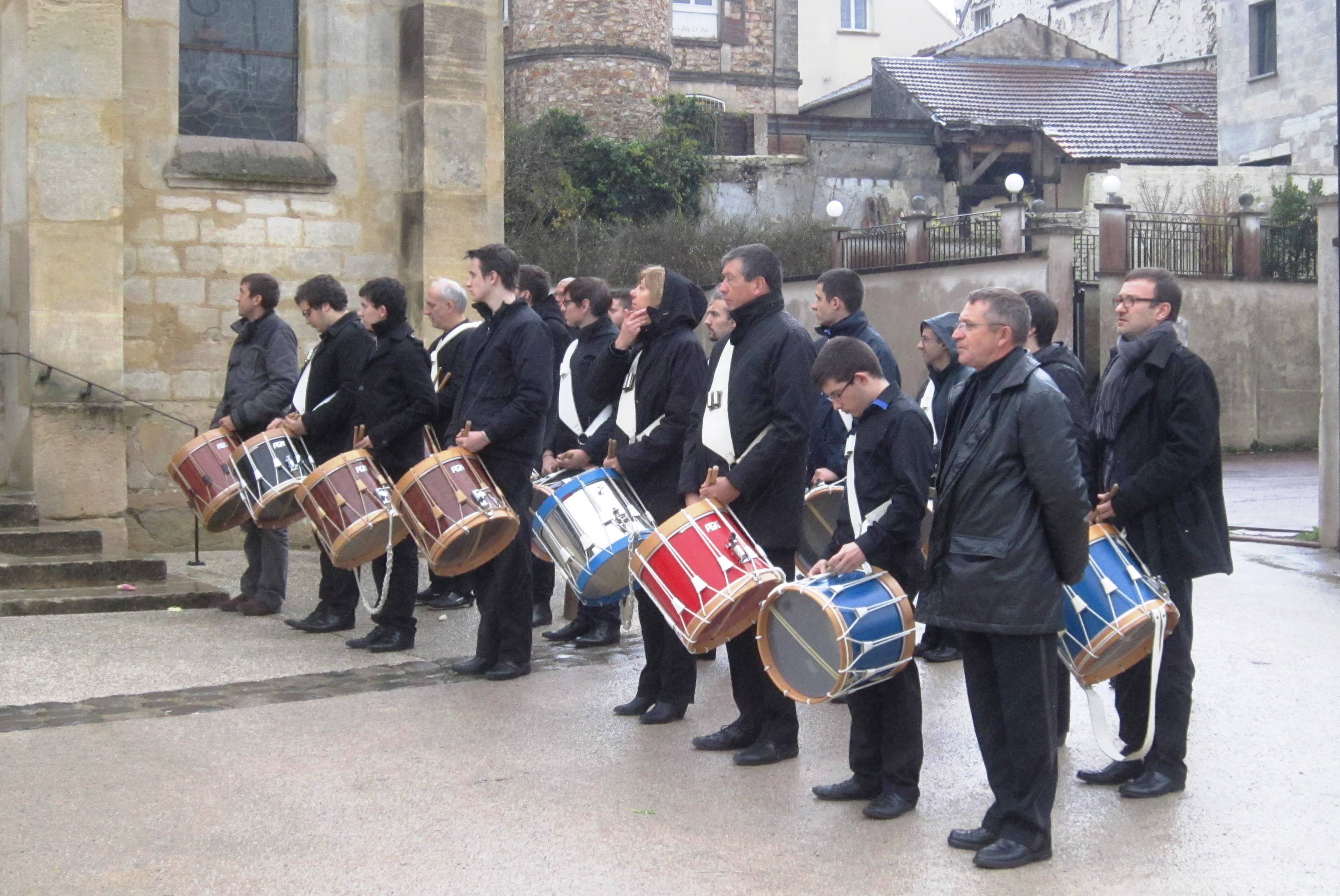 Les tambours de France aux obsèques Robert Goute, leur président fondateur